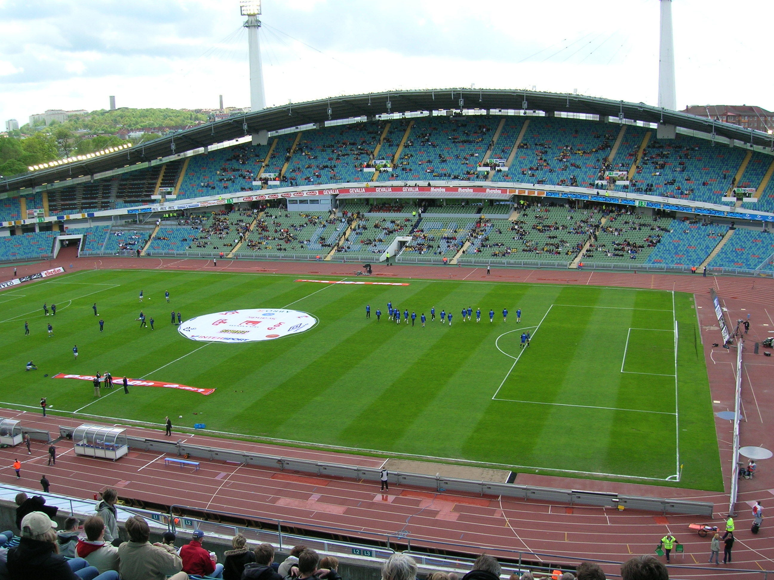 Bilden har jag tagit själv på tränigsmatchen mellan Sverige och Finland (0-0) den 25 maj 2006.